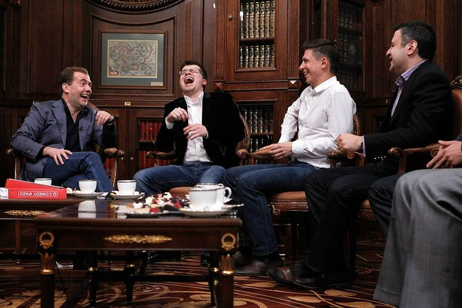 Встреча с участниками Comedy club